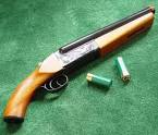 Обрез